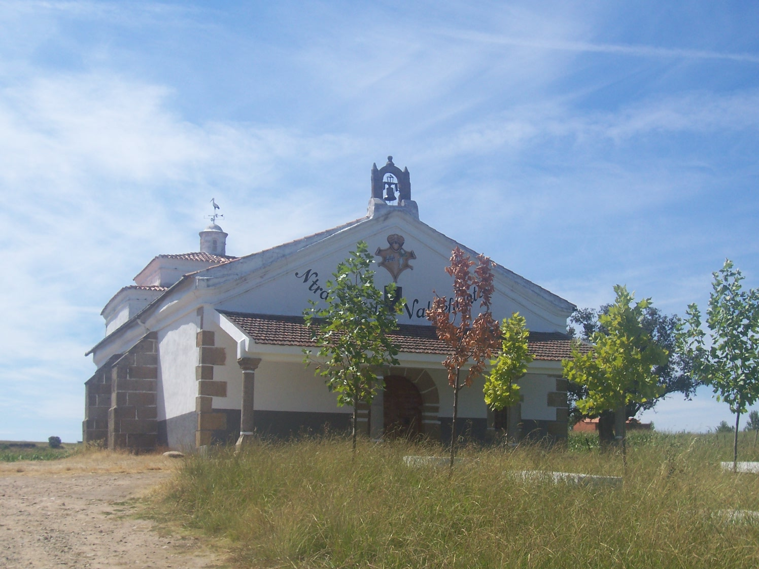 Ermita de Nuestra Señora de Valdefuentes, en Montehermoso, Cáceres, España (2007)